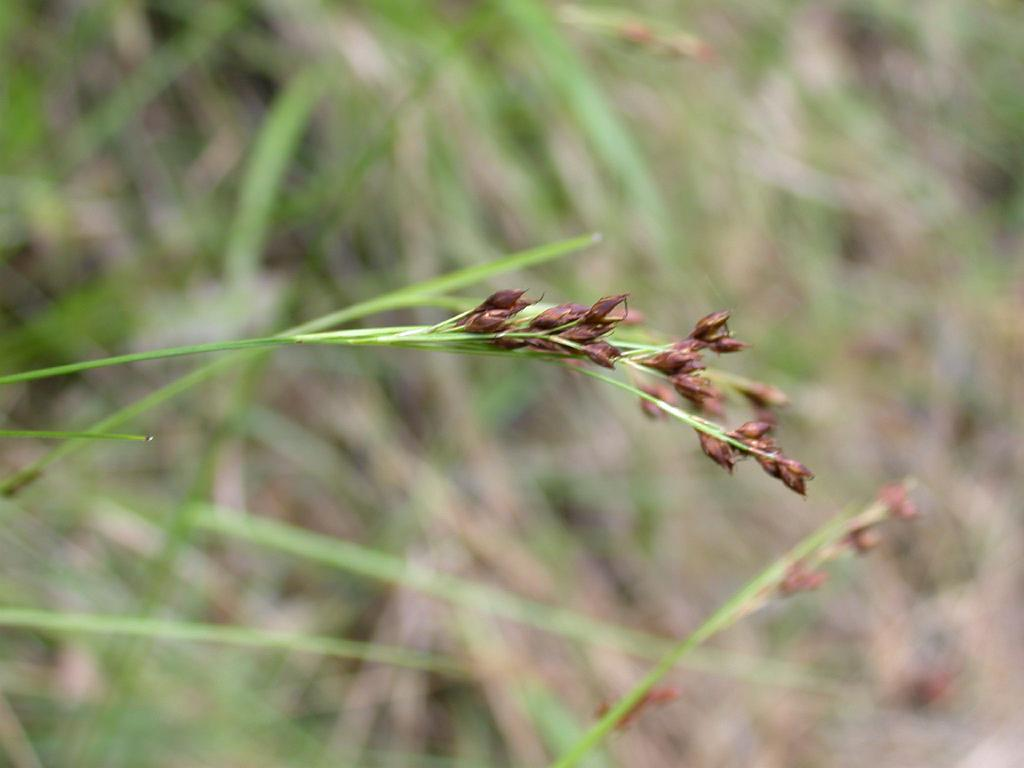 Rhynchospora_brownii（Cyperaceae)：トラノハナヒゲ 和歌山県田辺市 Tanabe city, Wakayama pref. Japan 2004年7月27日